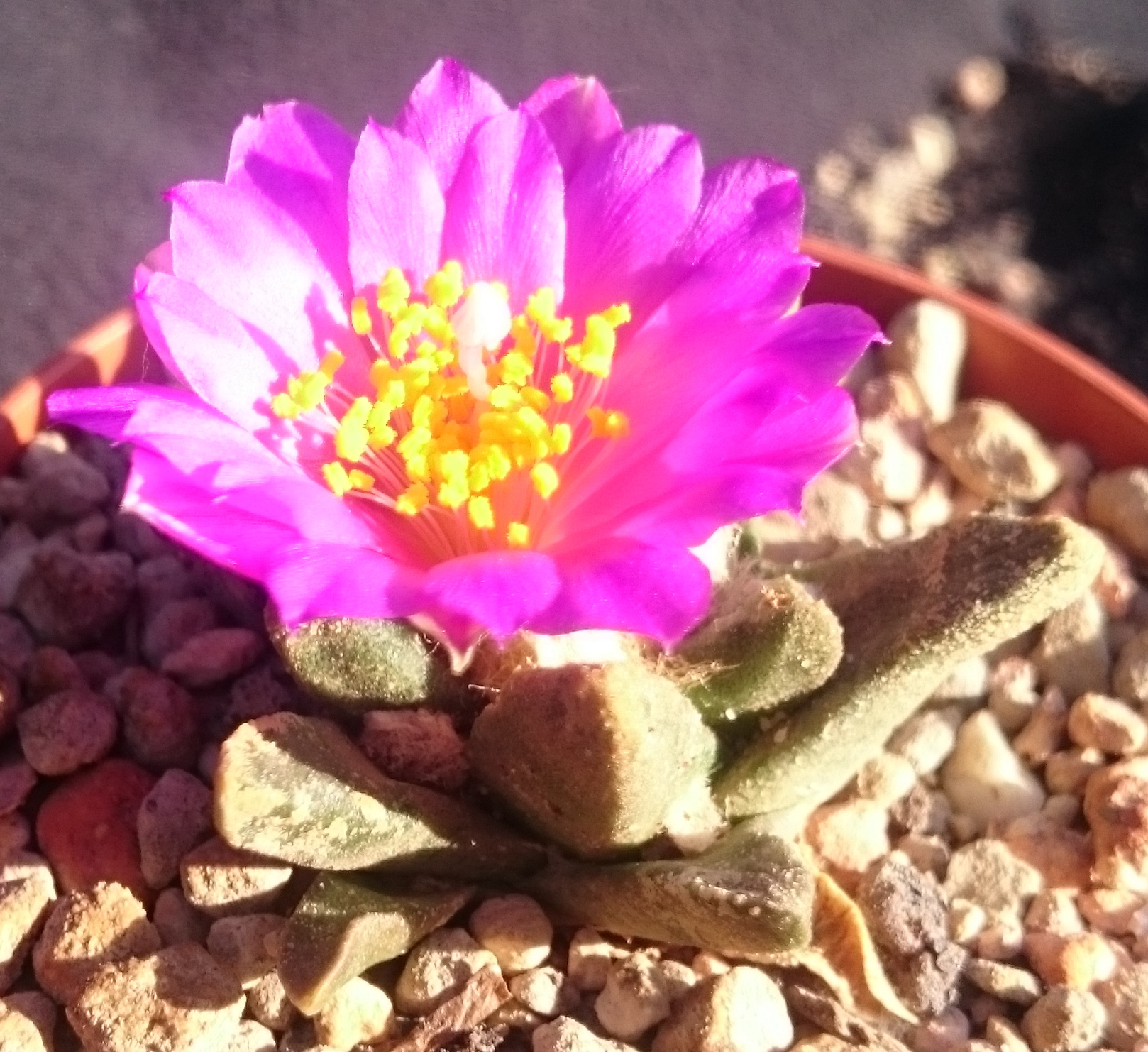 Blüte an Ariocarpus scaphirostris, Kulturpflanze